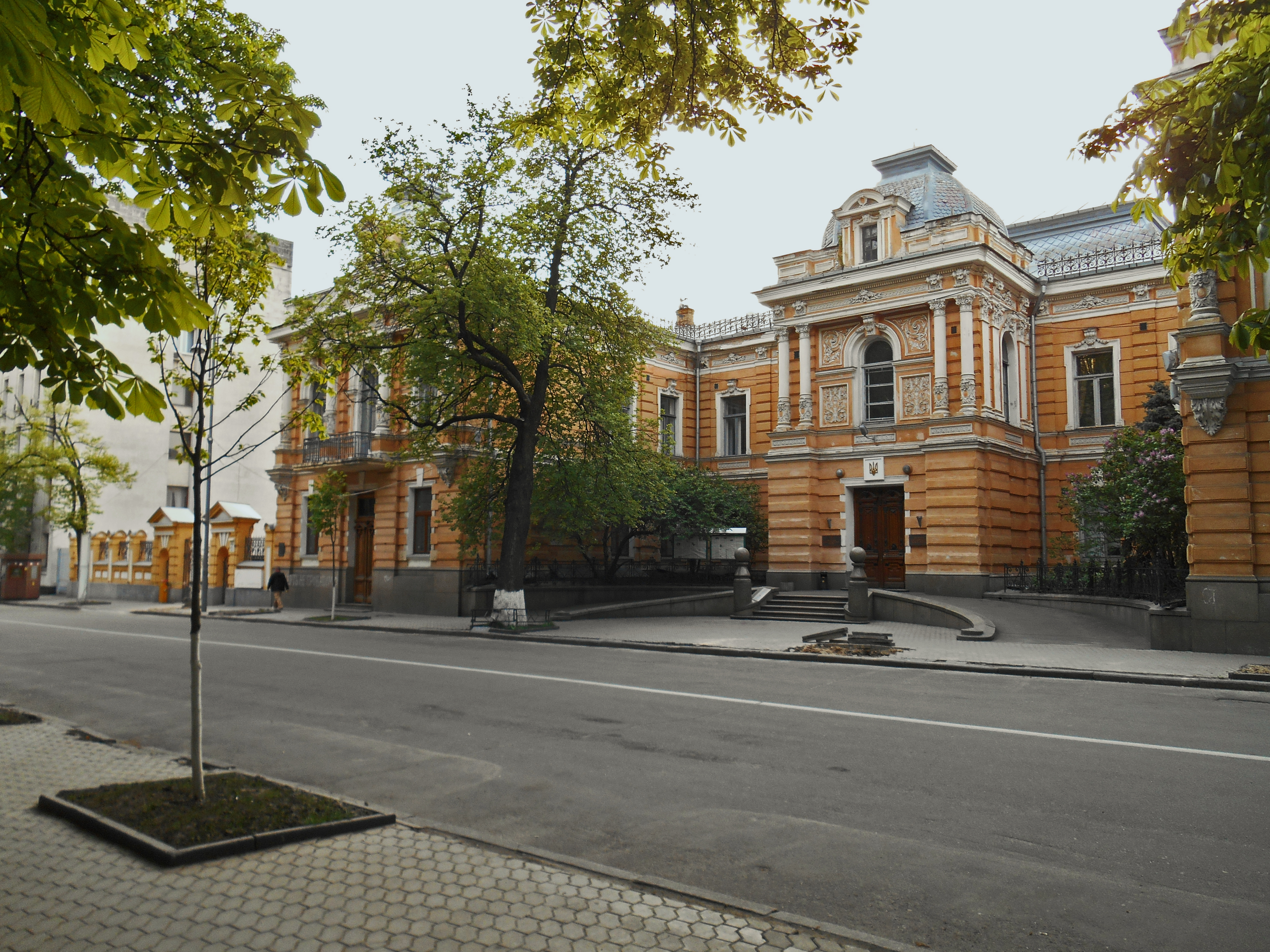 Особняк С. Лібермана, Київ, Банкова вул., 2